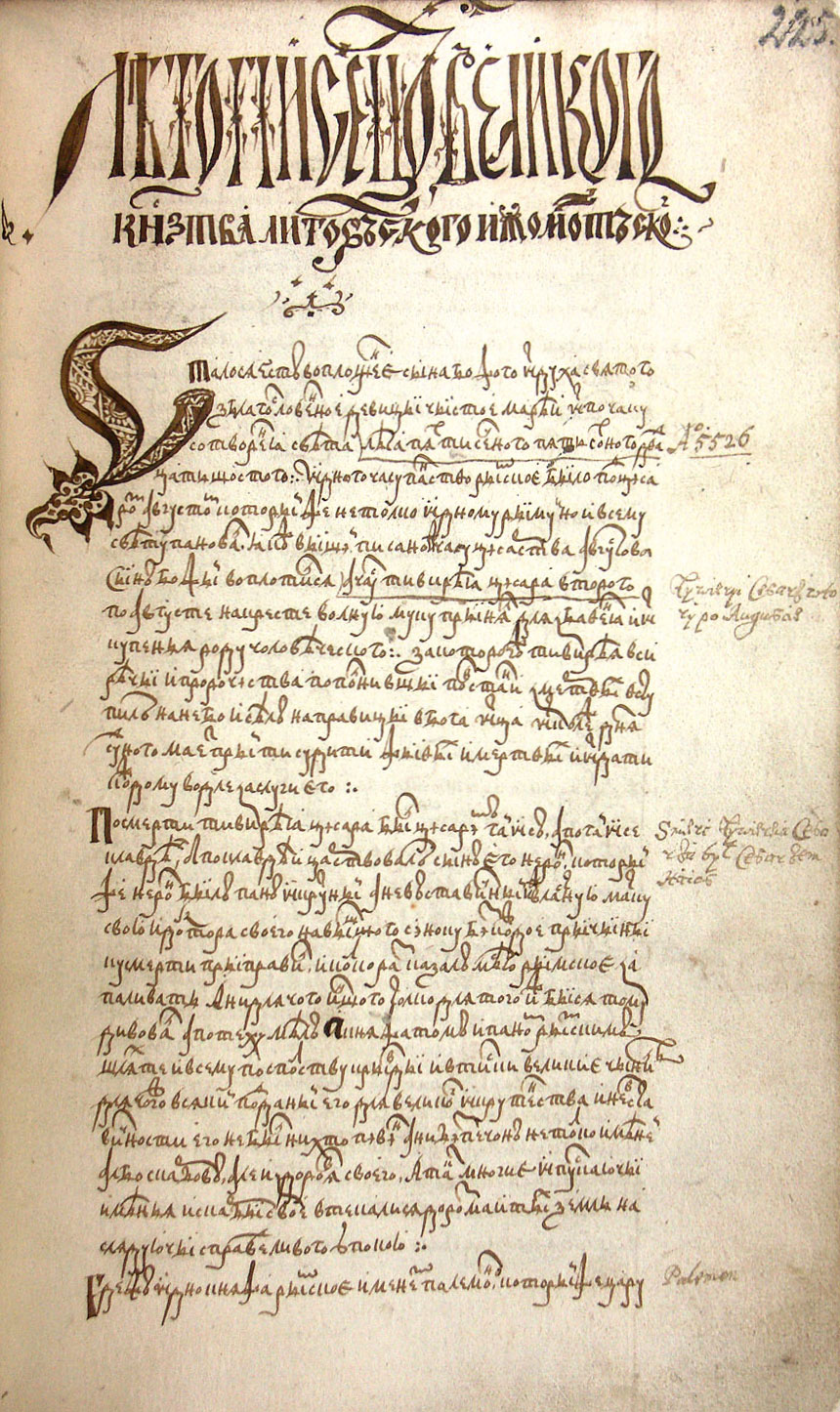 Беларуская (тарашкевіца): Летапісец Вялікага Княства Літоўскага і Жамойцкага